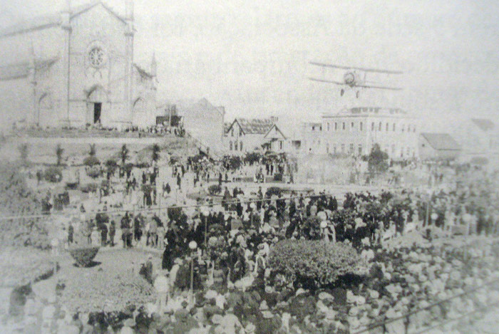 Manifestações pró-Estado Novo em Caxias do Sul